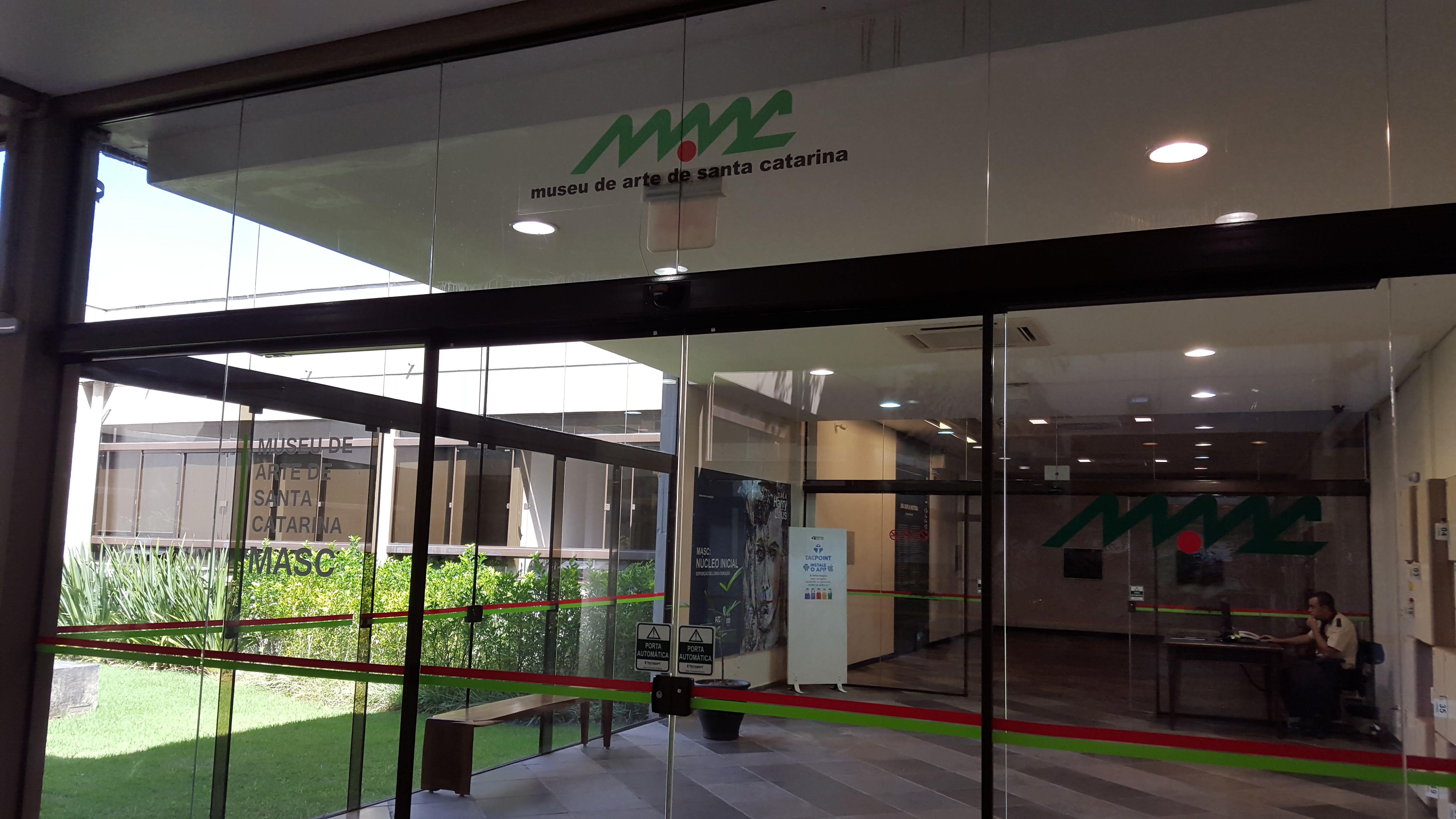 Entrada do Museu de Arte de Santa Catarina (MASC), dentro das dependências do Centro Integrado de Cultura (CIC).